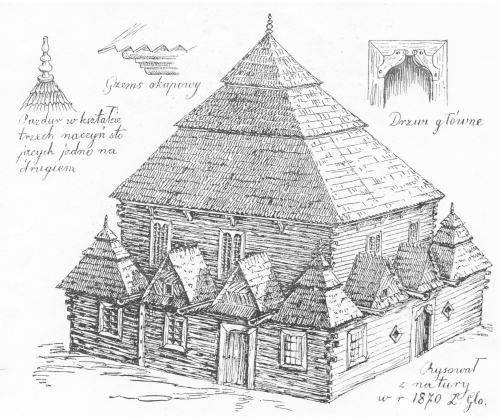 Stara, drewniana synagoga w Wysokiem Mazowieckiem. Rysunek autorstwa Zygmunta Glogera z 1870 roku.